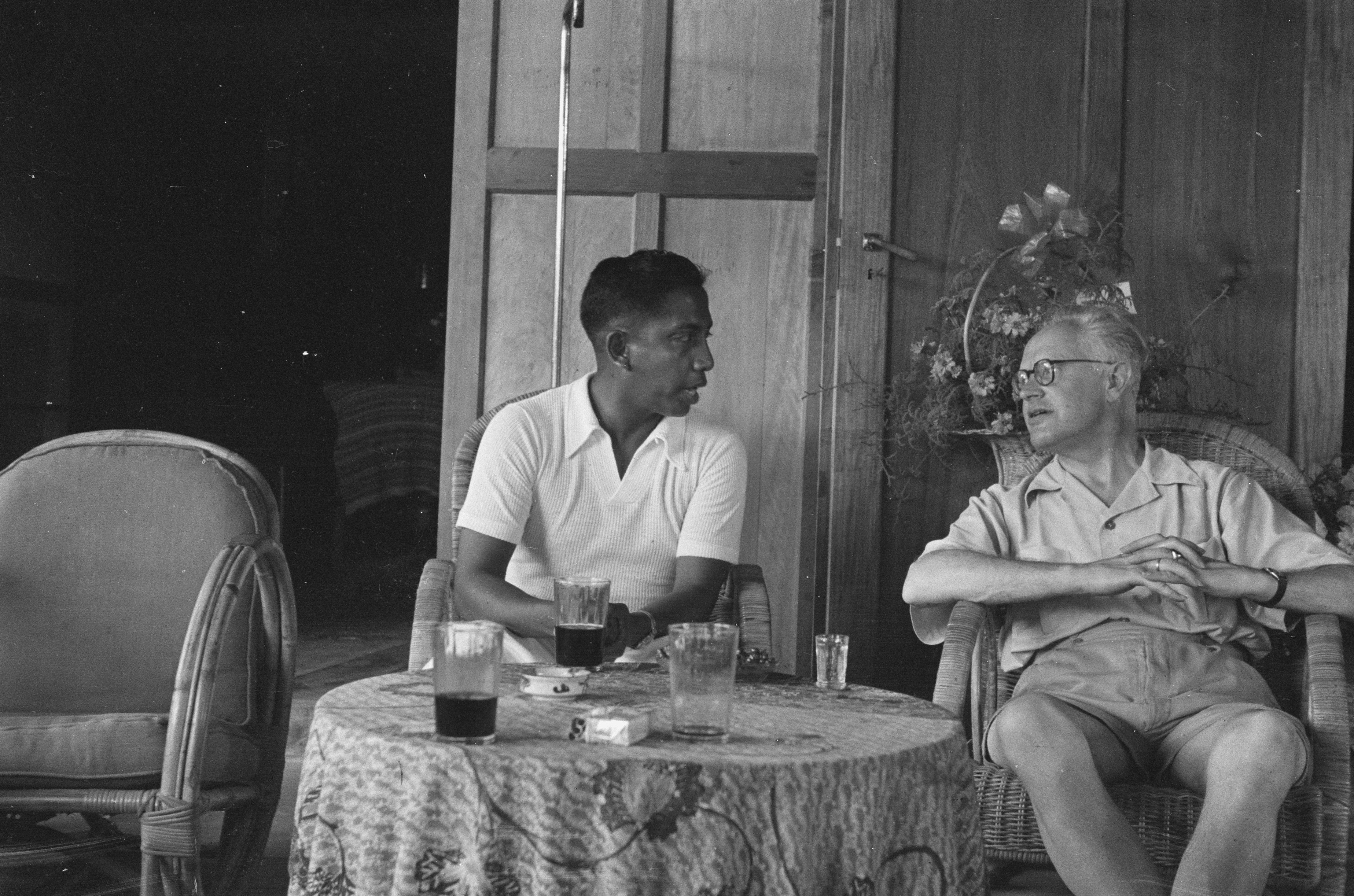 Collectie / Archief : Fotocollectie Dienst voor Legercontacten Indonesië Reportage / Serie : [DLC] Bezoek minister Romme aan Grote Oost [Makassar, Menado, Ambon, Flores, Soerabaja] Beschrijving : Ambon. Dr. C.P.M. Romme in gesprek met Julius Tahija, minister van Sociale Zaken van Indonesia Timur (Oost-Indonesië) Datum : 29 januari 1947 Locatie : Indonesië, Nederlands-Indië Persoonsnaam : Romme, C.P.M. Fotograaf : Fotograaf Onbekend / DLC Auteursrechthebbende : Nationaal Archief Materiaalsoort : Negatief (zwart/wit) Nummer archiefinventaris : bekijk toegang 2.24.04.03 Bestanddeelnummer : 138-2-2